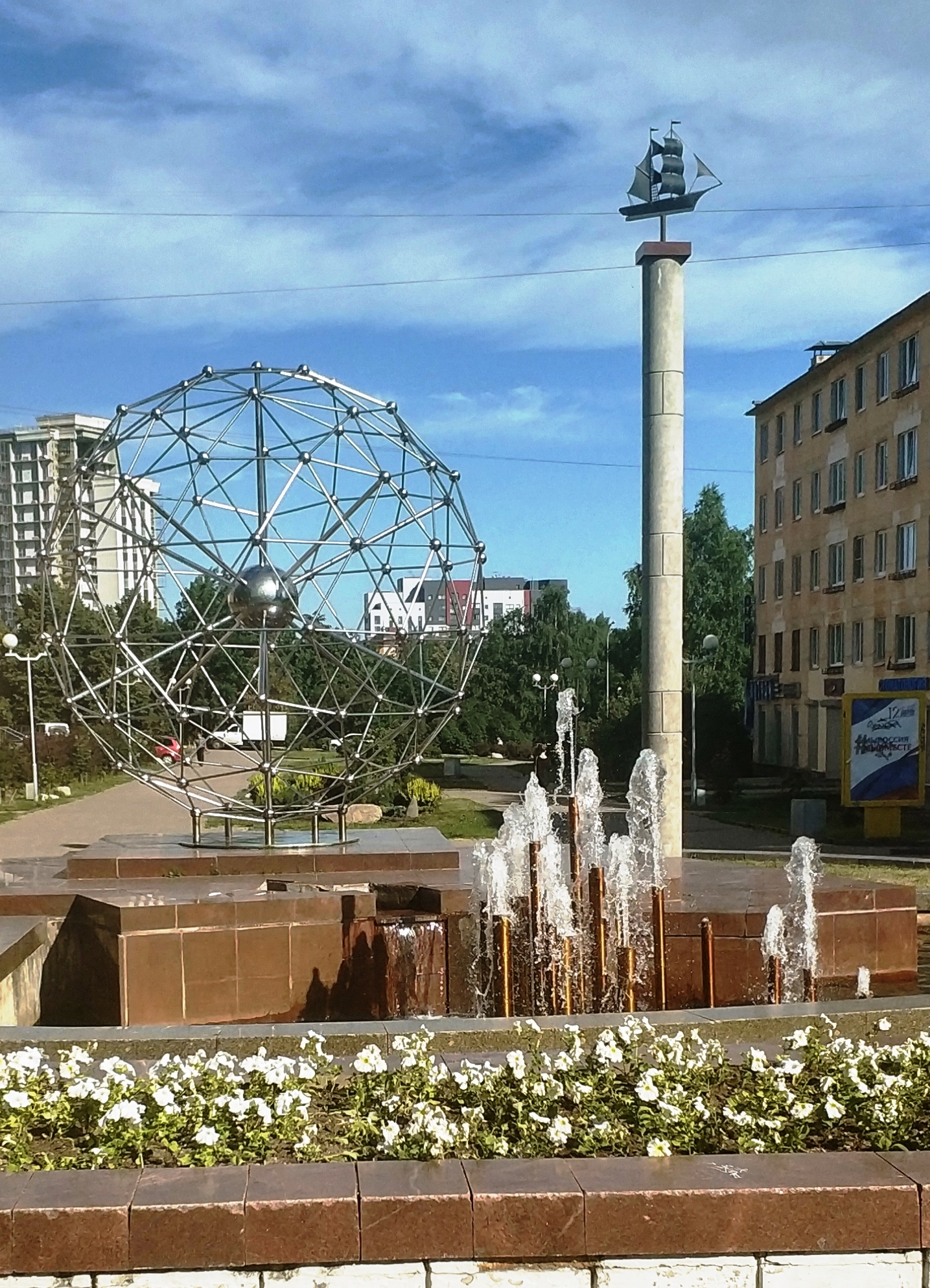 Фонтан "Молекула Фуллерена" (арх. Е. Таев, А. А. Борщевский, инж.-констр. Д. Мелехов) в Петрозаводске на пр. Ленина.